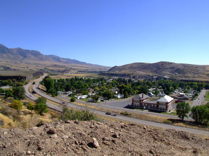 Inkom